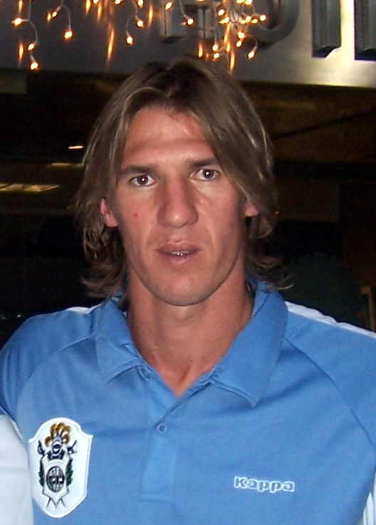 Foto del futbolista argentino Esteban Nicolás González en el 2009.